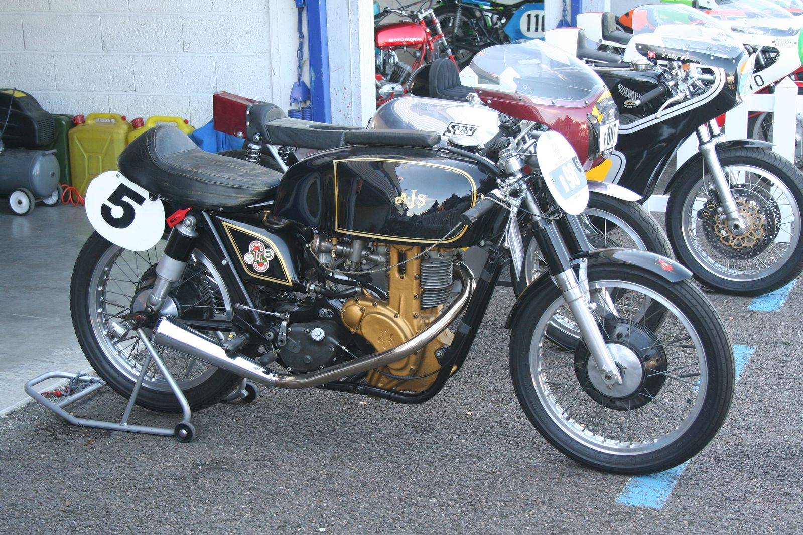 ajs